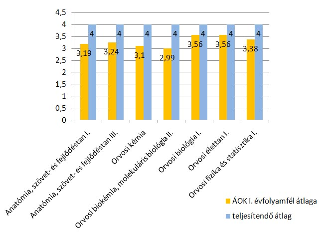 SE-ÁOK 1. évfolyamfél, 2007/2008 I. félévének a Korányi Frigyes Szakkollégium átlagához viszonyított diagramja